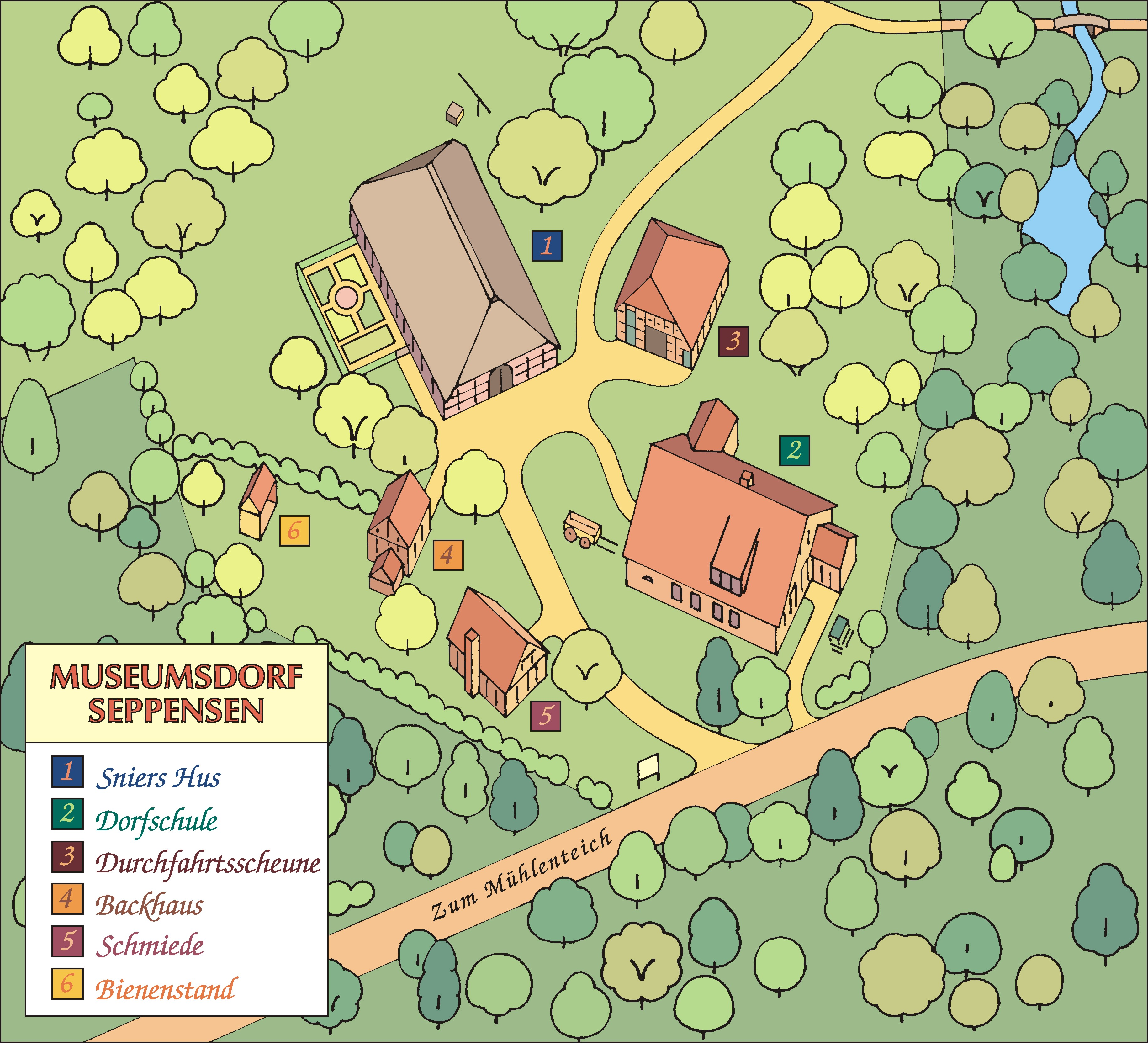 Museumsdorf Seppensen (Dorfplan)